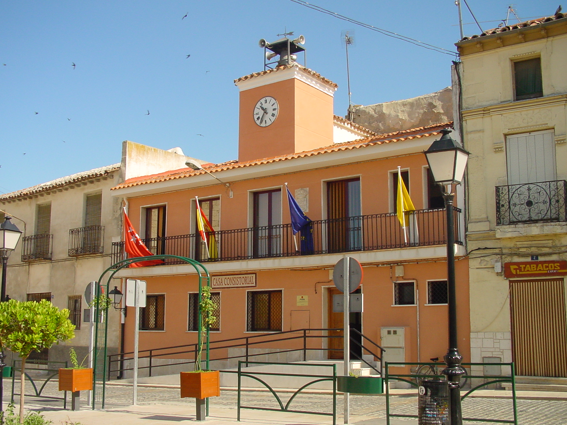 Ayuntamiento de Villaconejos.